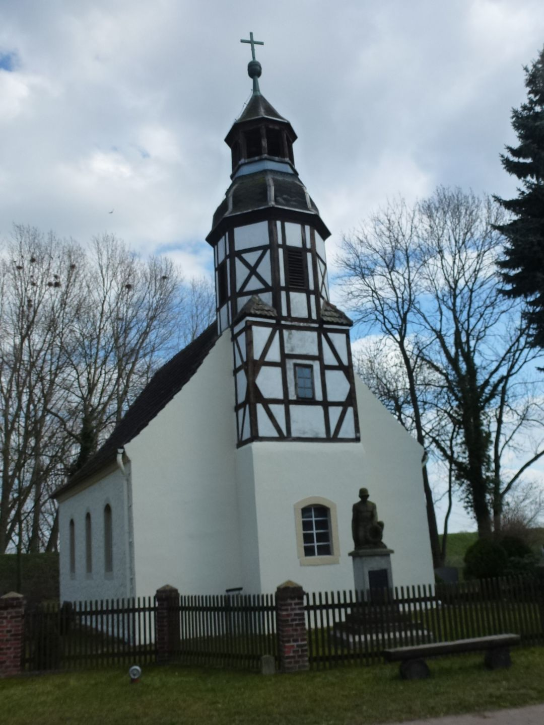 Kirche in Bösewig